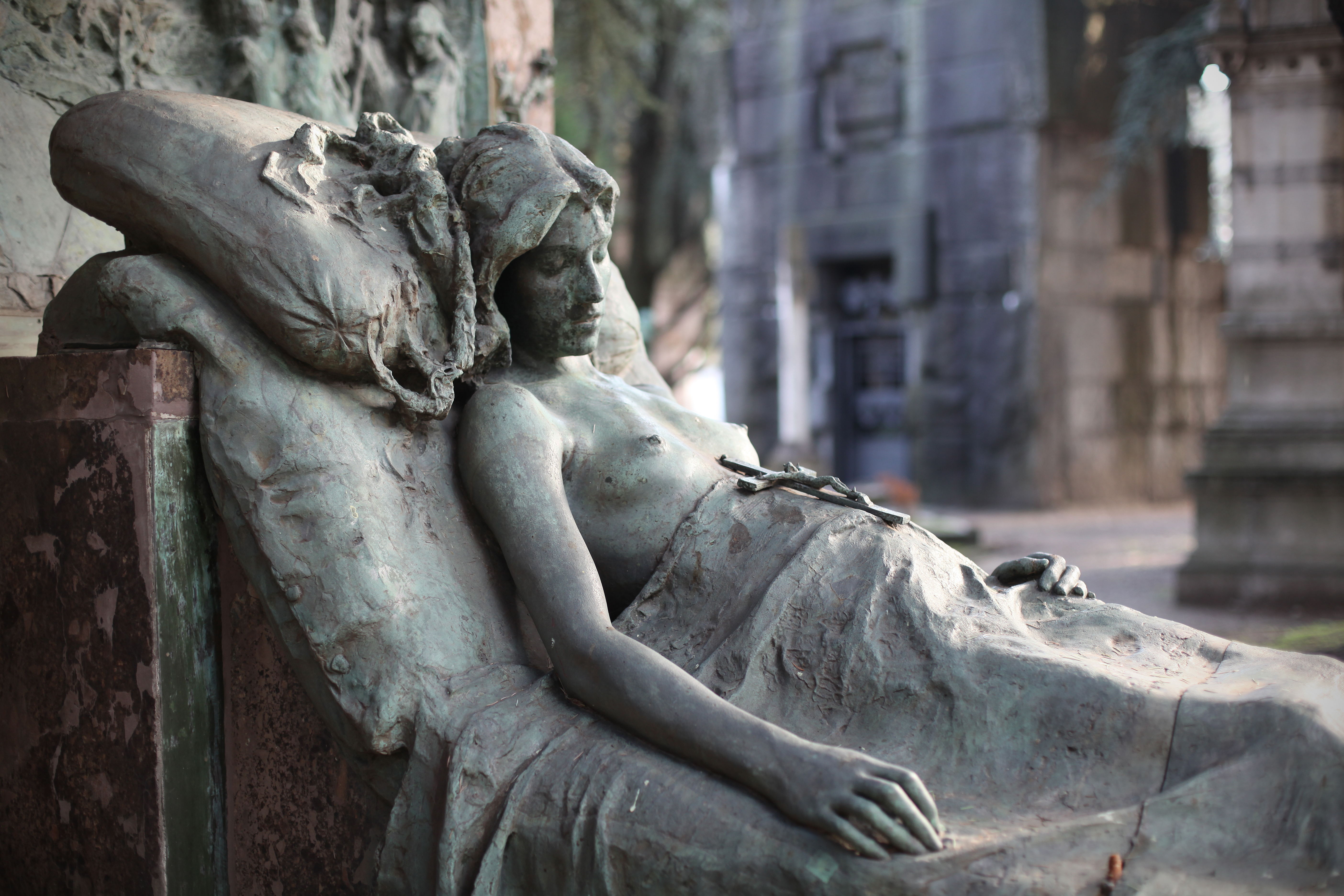 Enrico Butti (1847-1932) La morente, edicola Isabella Airold in Casati (1890.1891), Cimitero Monumentale di Milano